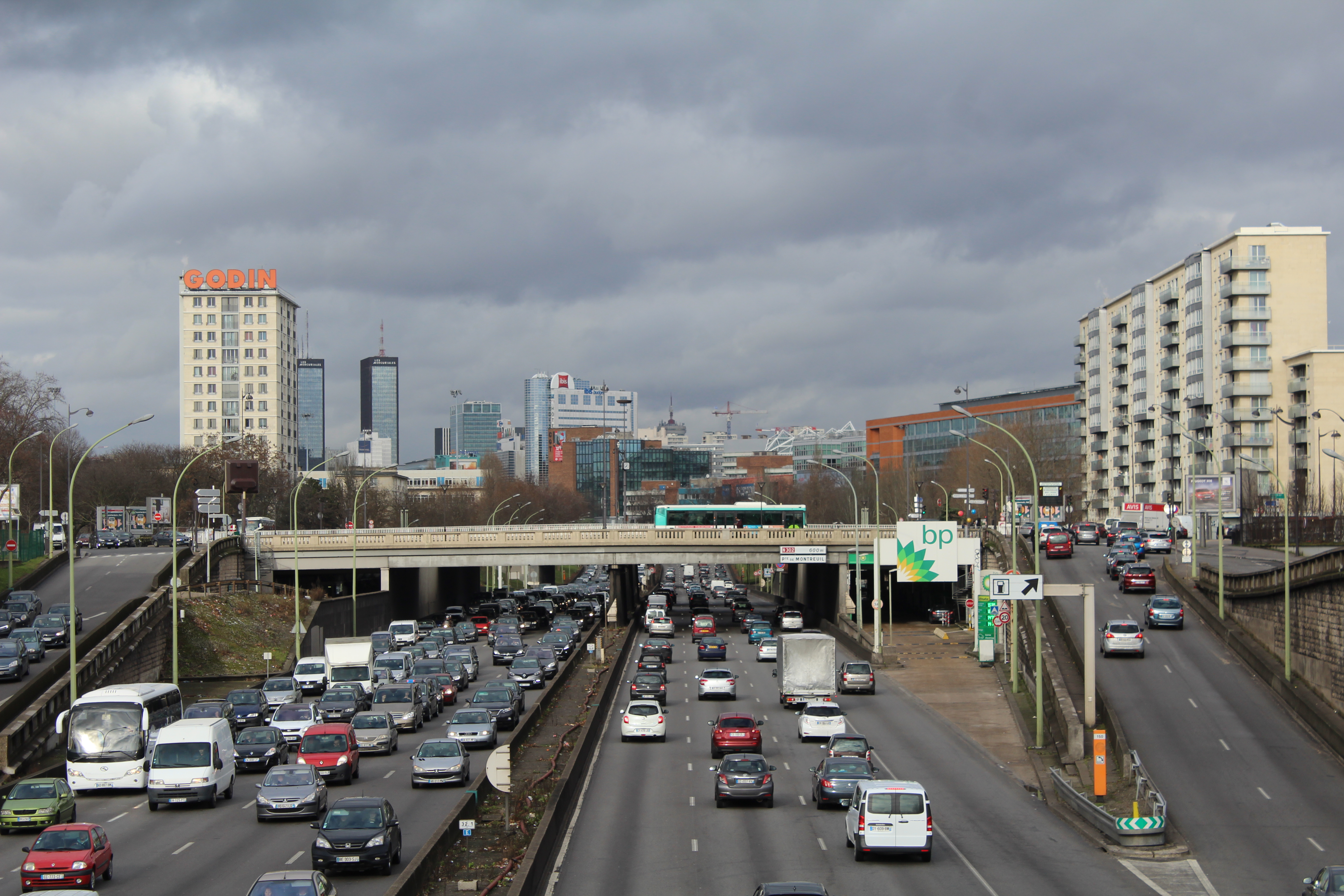 Boulevard périphérique de Paris entre les portes de Vincennes et de Saint-Mandé.